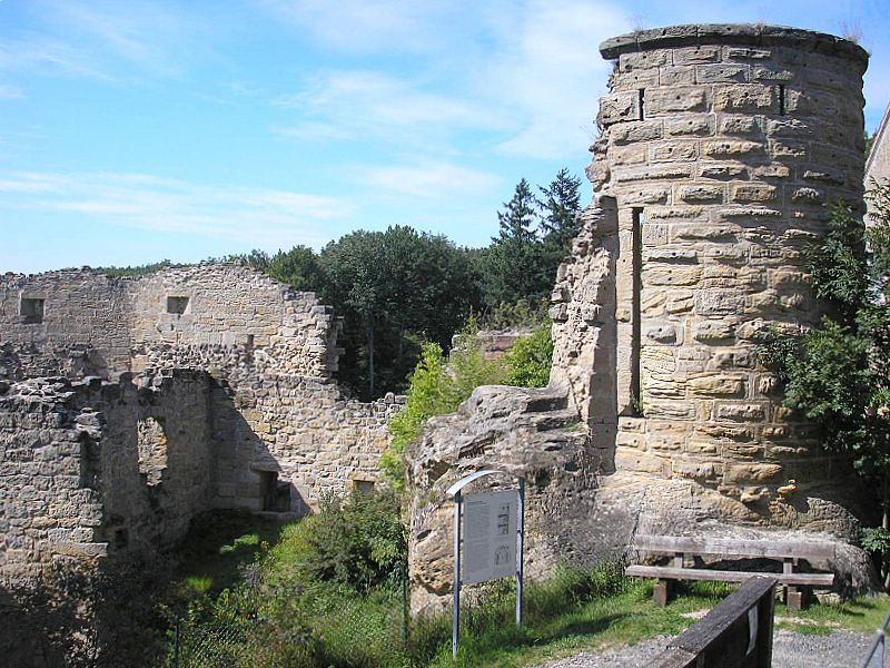 Burg Lichtenstein, Ruine der Nordburg (Gemeinde Pfarrweisach, Landkreis Haßberge, Unterfranken). Ostteil. Eigene Aufnahme, Aug. 2007 / Lichtenstein castle (Ruin of the northern castle) near Pfarrweisach (Lower Franconia, Germany). Eastern part. Own photo, Aug. 2007